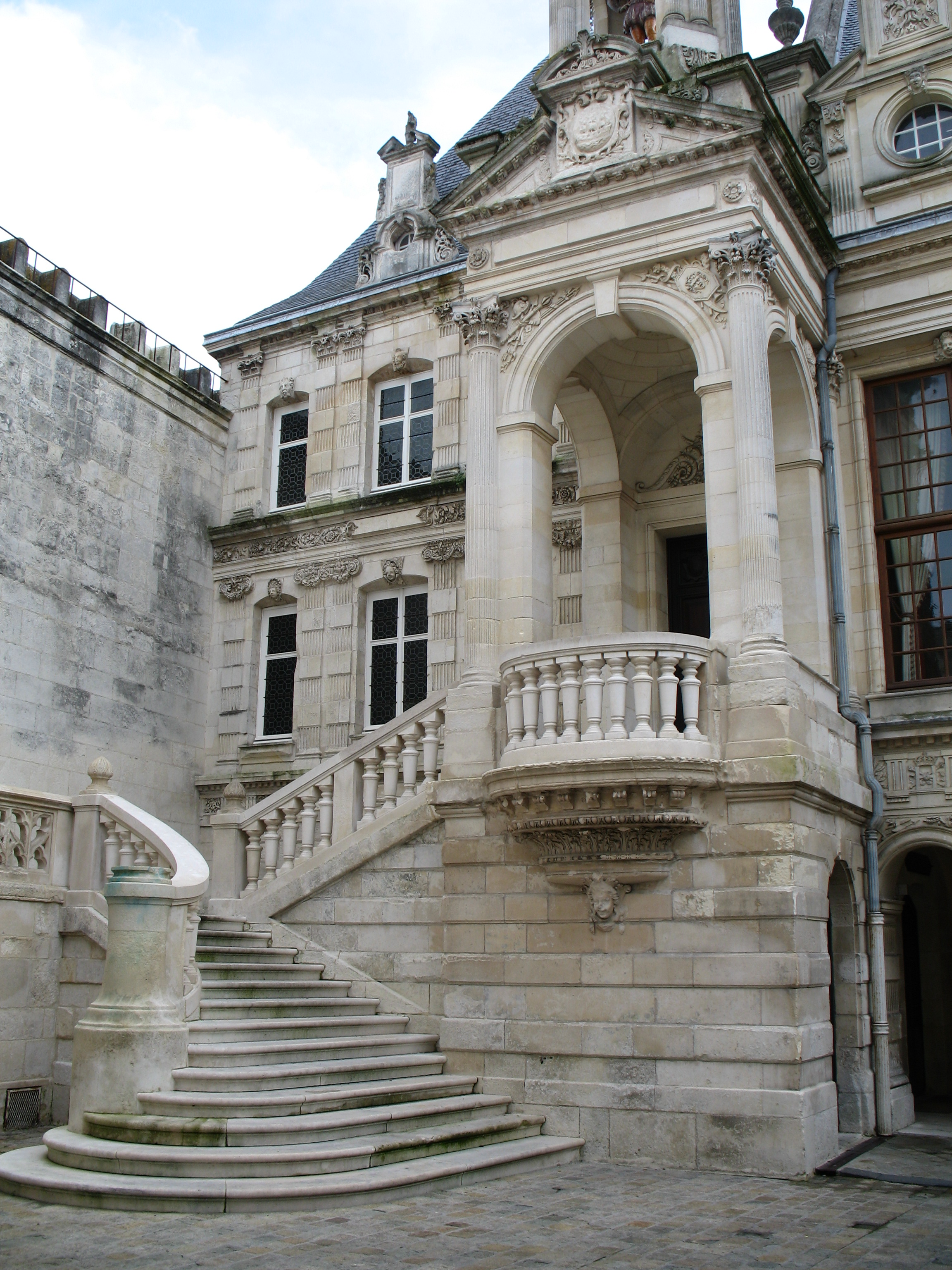 Escalier de la cour intérieure de l'Hôtel de Ville de La Rochelle, France